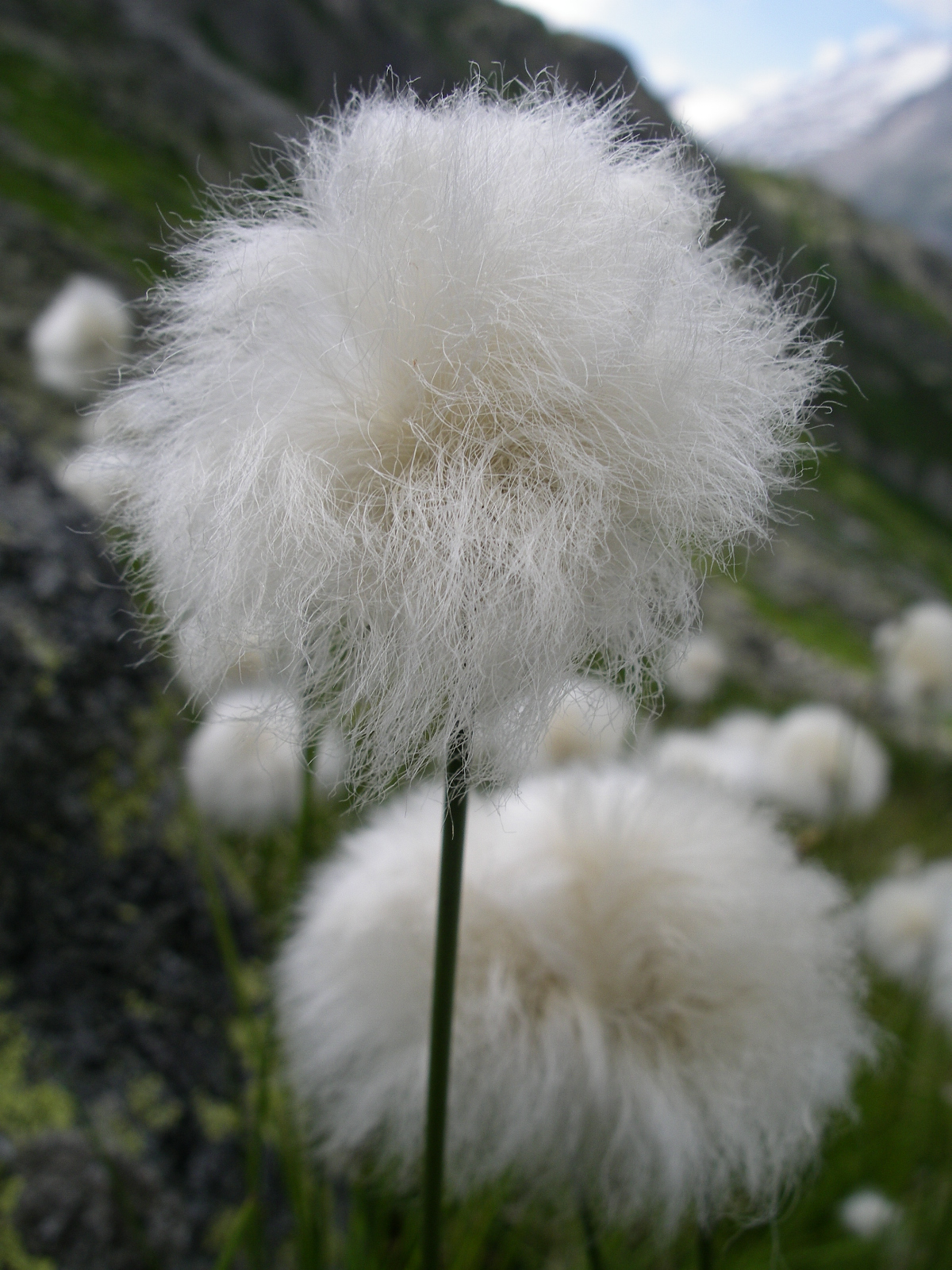 Wollgras (Eriophorum scheuchzeri in der Schweiz)